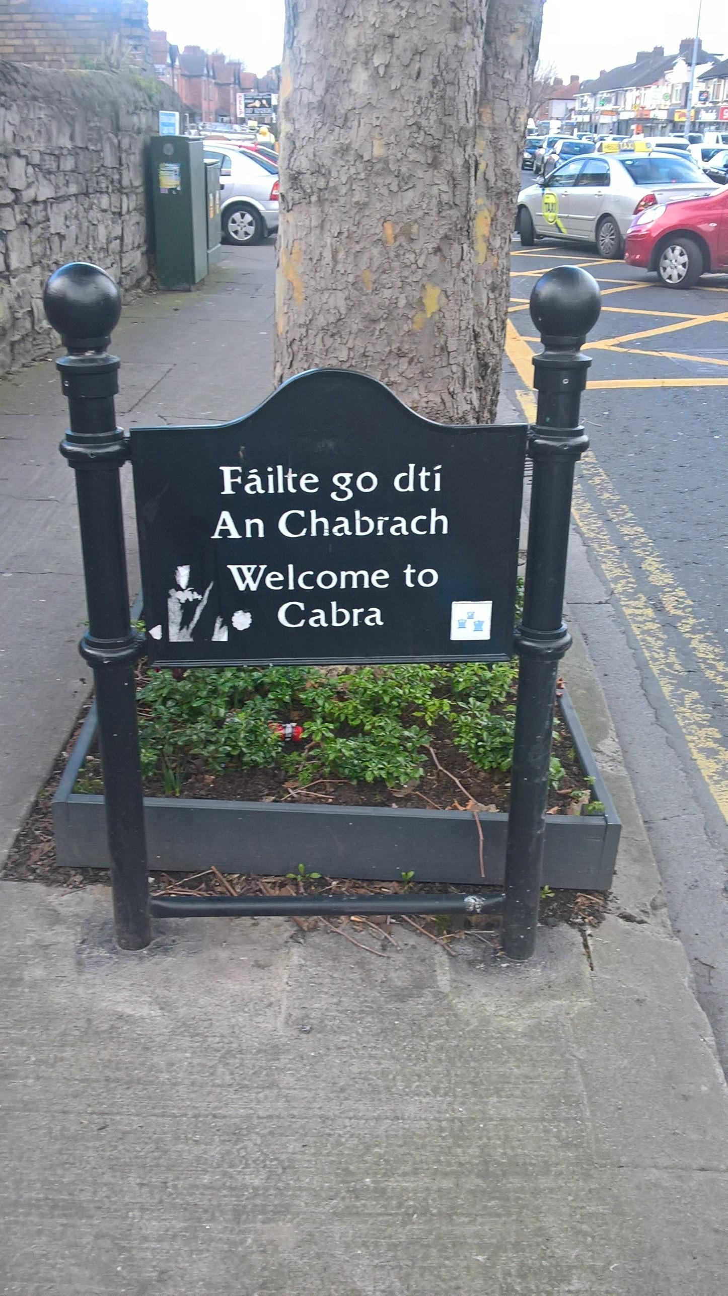 Comhartha dhátheangach fáilte go dtí An Chabrach.